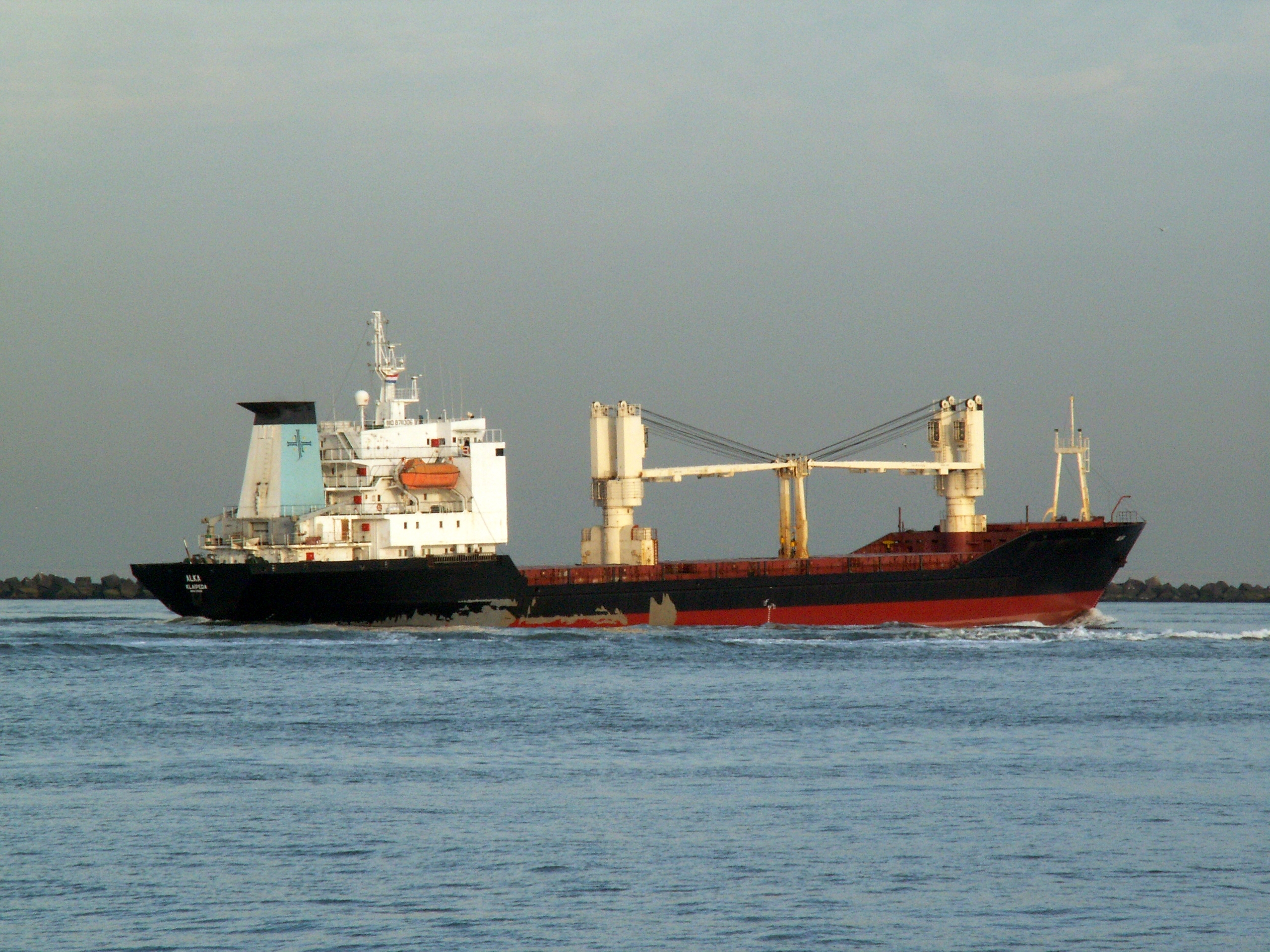 Alka IMO 8711306.